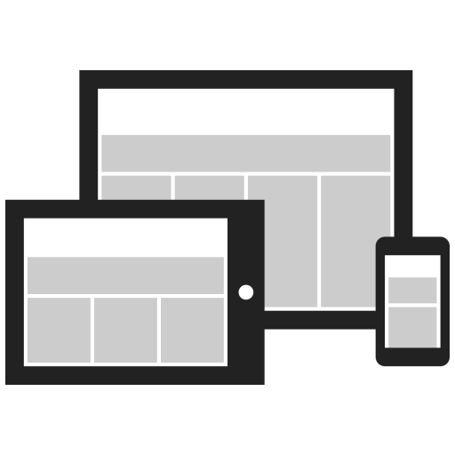 Responsive